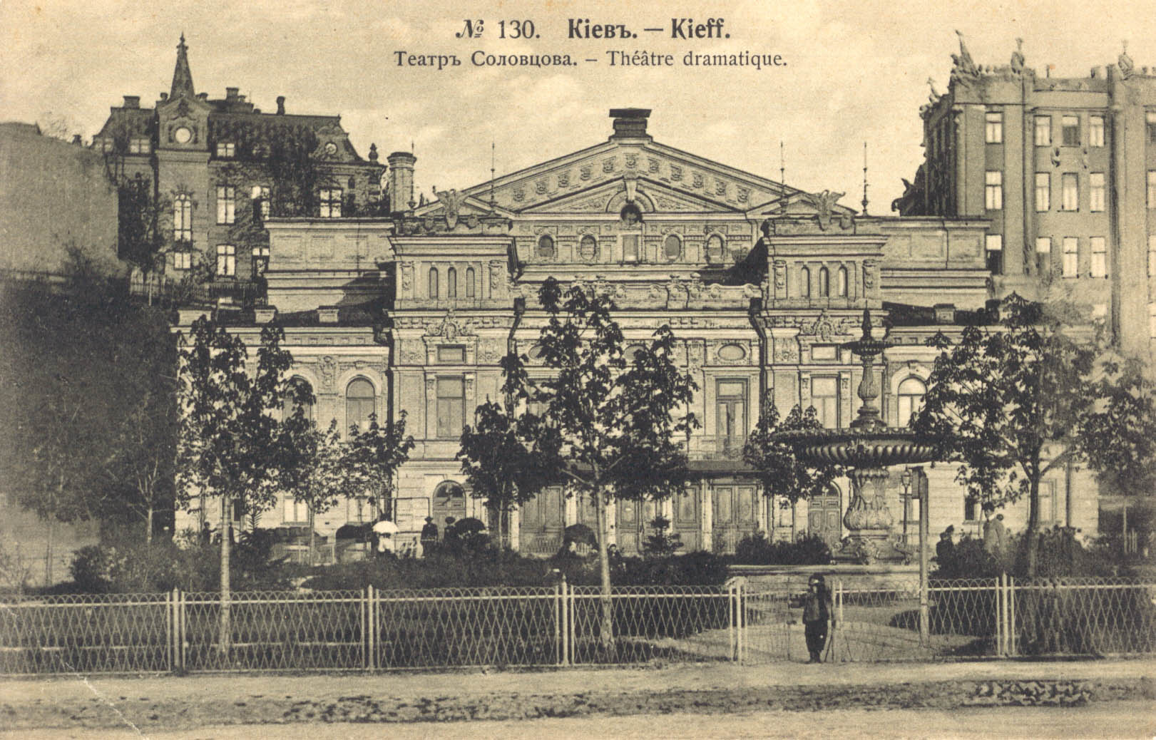 Театр Соловцова в Киеве, начало ХХ века